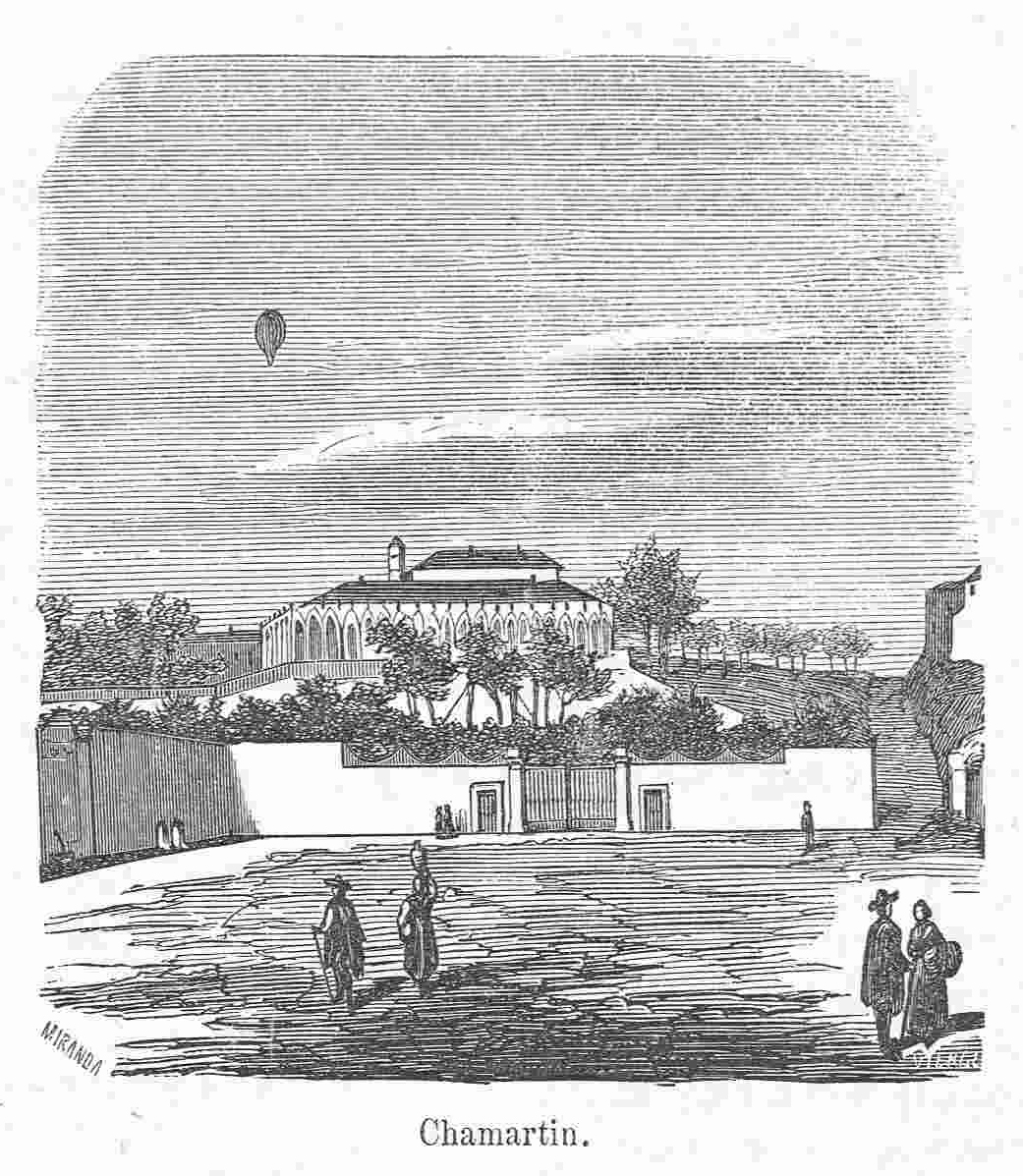 Chamartín.